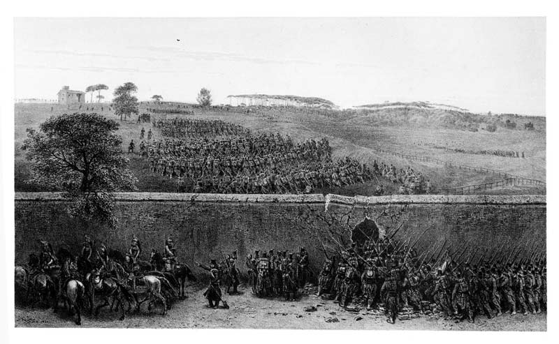 Nella notte tra il 2 e il 3 giugno la Brigata Molliere penetra attraverso una breccia unendosi alla Brigata Levaillant che ha aggirato la villa da ovest e ingaggiando il nemico. Assedio di Roma, 1849